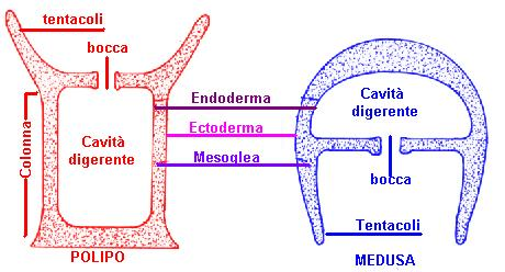 Confronto fra lo stadio di polipo e quello di medusa